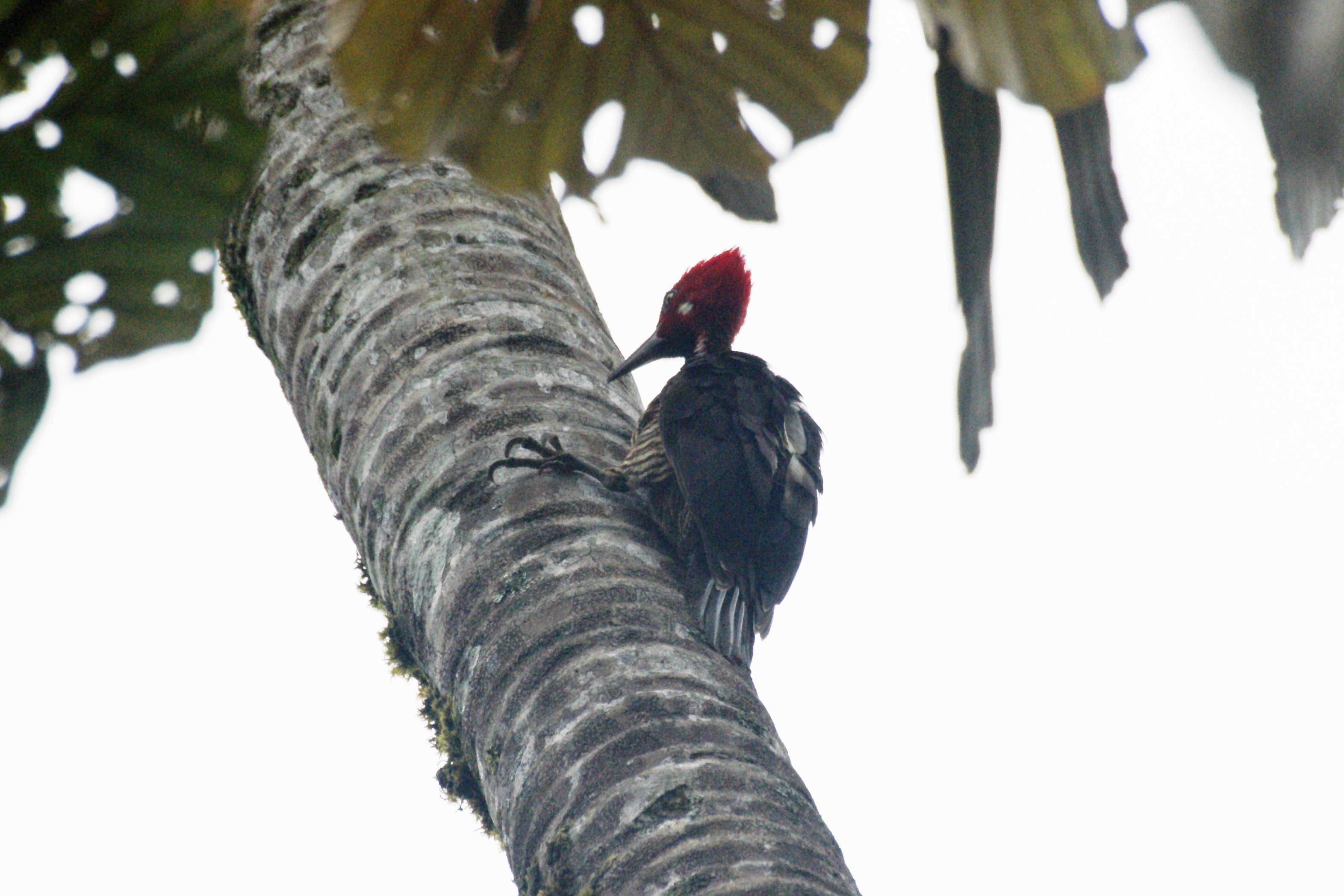 Guayaquil Woodpecker Campephilus gayaquilensis, Ecuador